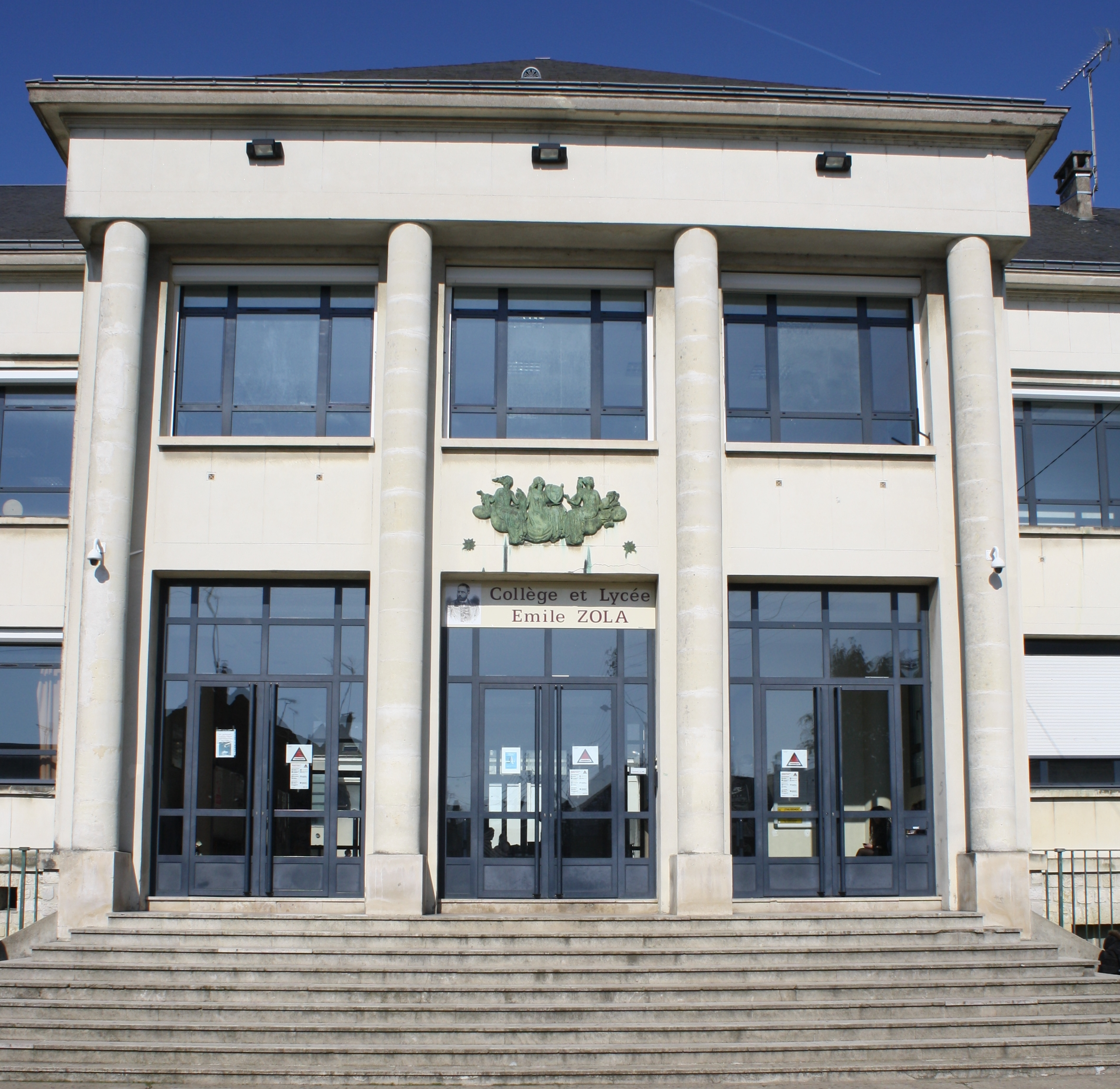 entrée monumentale du lycée et collège Émile-Zola, surmontée d'un bas-relief de Guy-Charles Revol, Châteaudun, Eure-et-Loir, France.